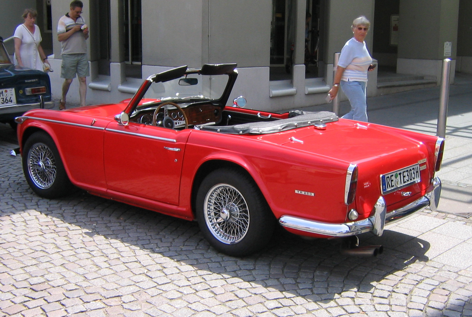 aufgenommen während eines Oldtimer-Treffens im Emmendingen, Deutschland